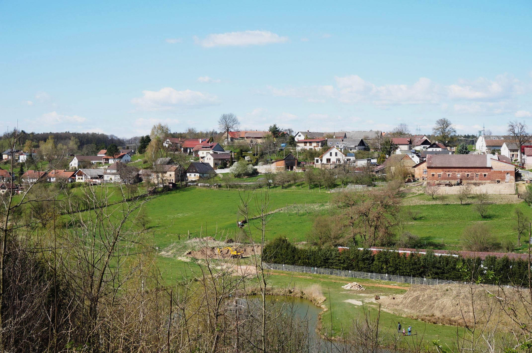 Hustirany, levy breh panorama